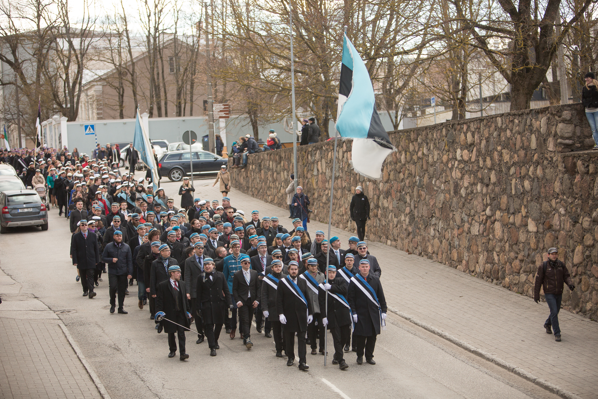 Üliõpilasorganisatsioonide rongkäik 2017. aasta volbril. Eesti Üliõpilaste Selts.